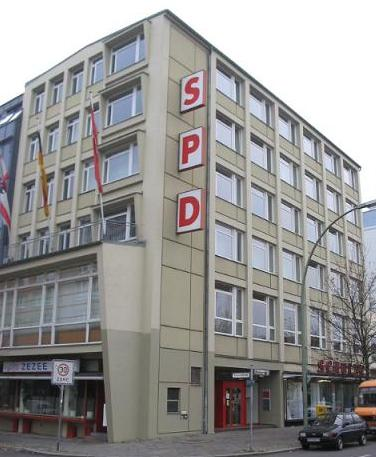 Kurt-Schumacher-Haus in Berlin-Wedding, Müllerstraße 163, Parteibüro der SPD-Berlin.